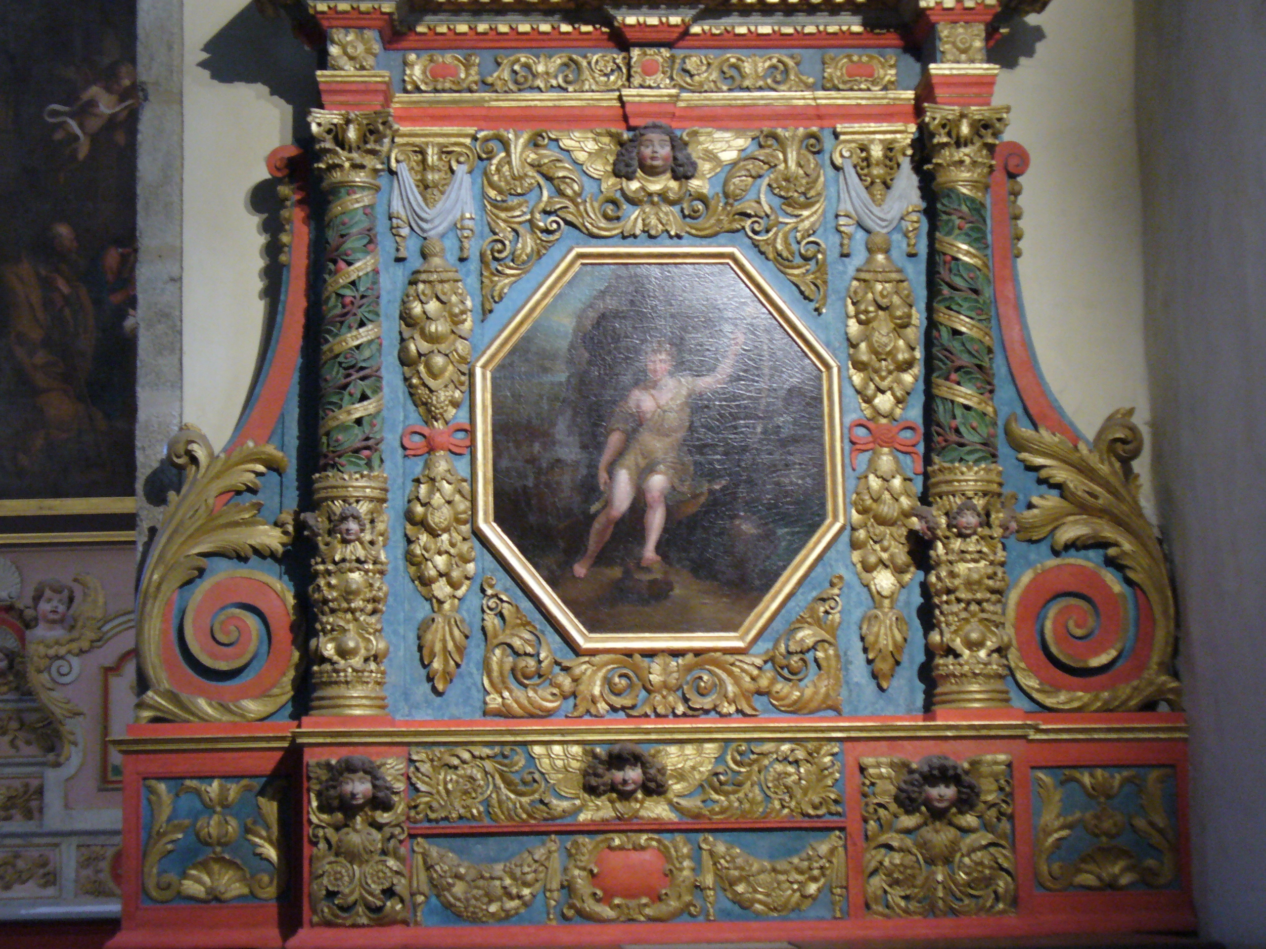 Darstellung des Kirchenheiligen Saint Thegonnec-Thegonnec spannte für den Bau der Kirche den Teufel in Gestalt eines Wolfes vor seinen Karren. Eglise Notre Dame de Saint Thegonnec-Departement Finistère-Region Bretagne